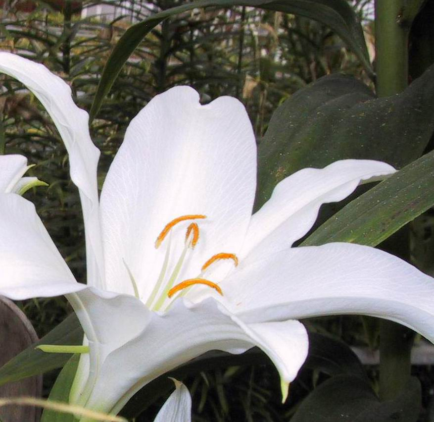 Lilium japonicum flower